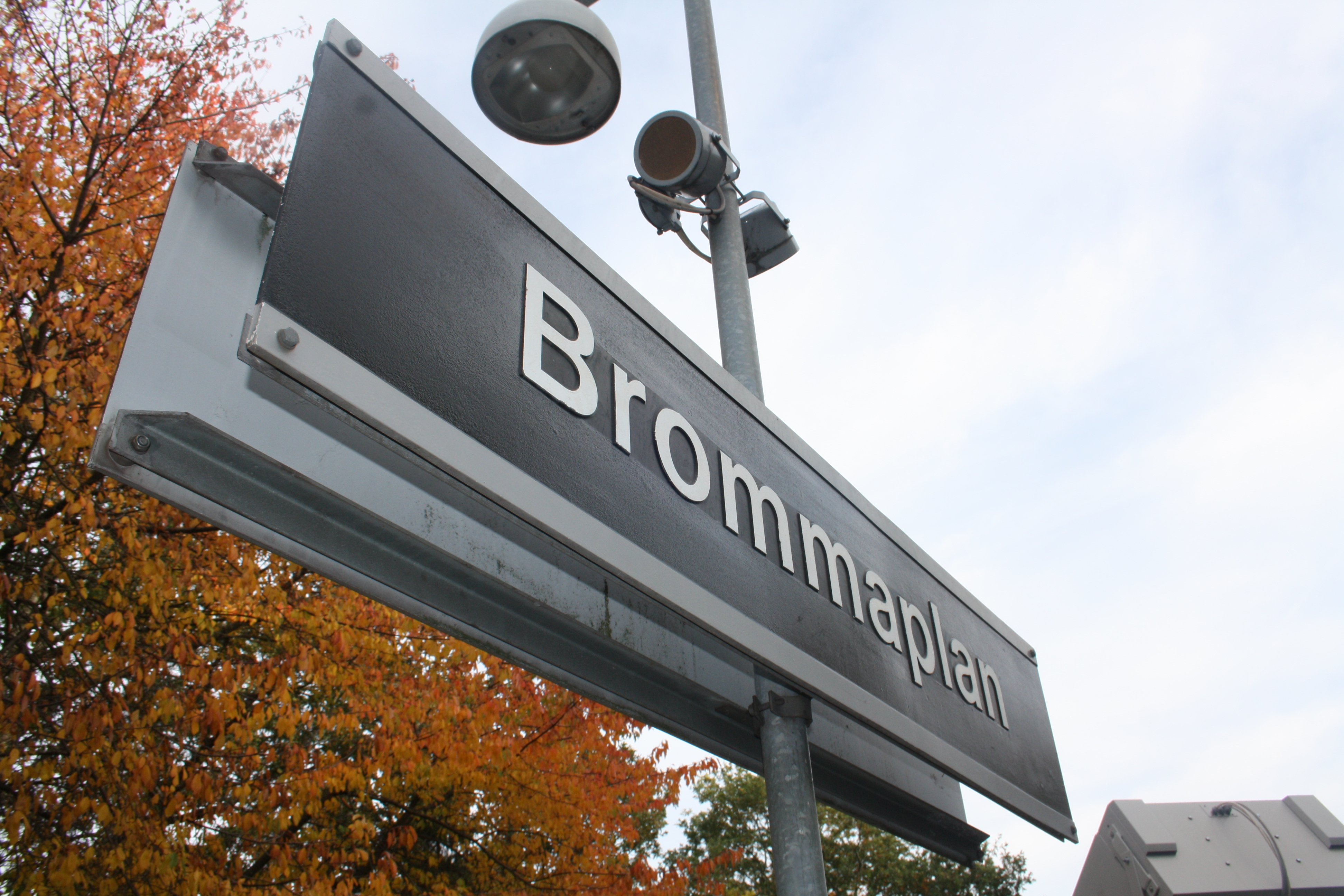 Brommaplan tunnelbana